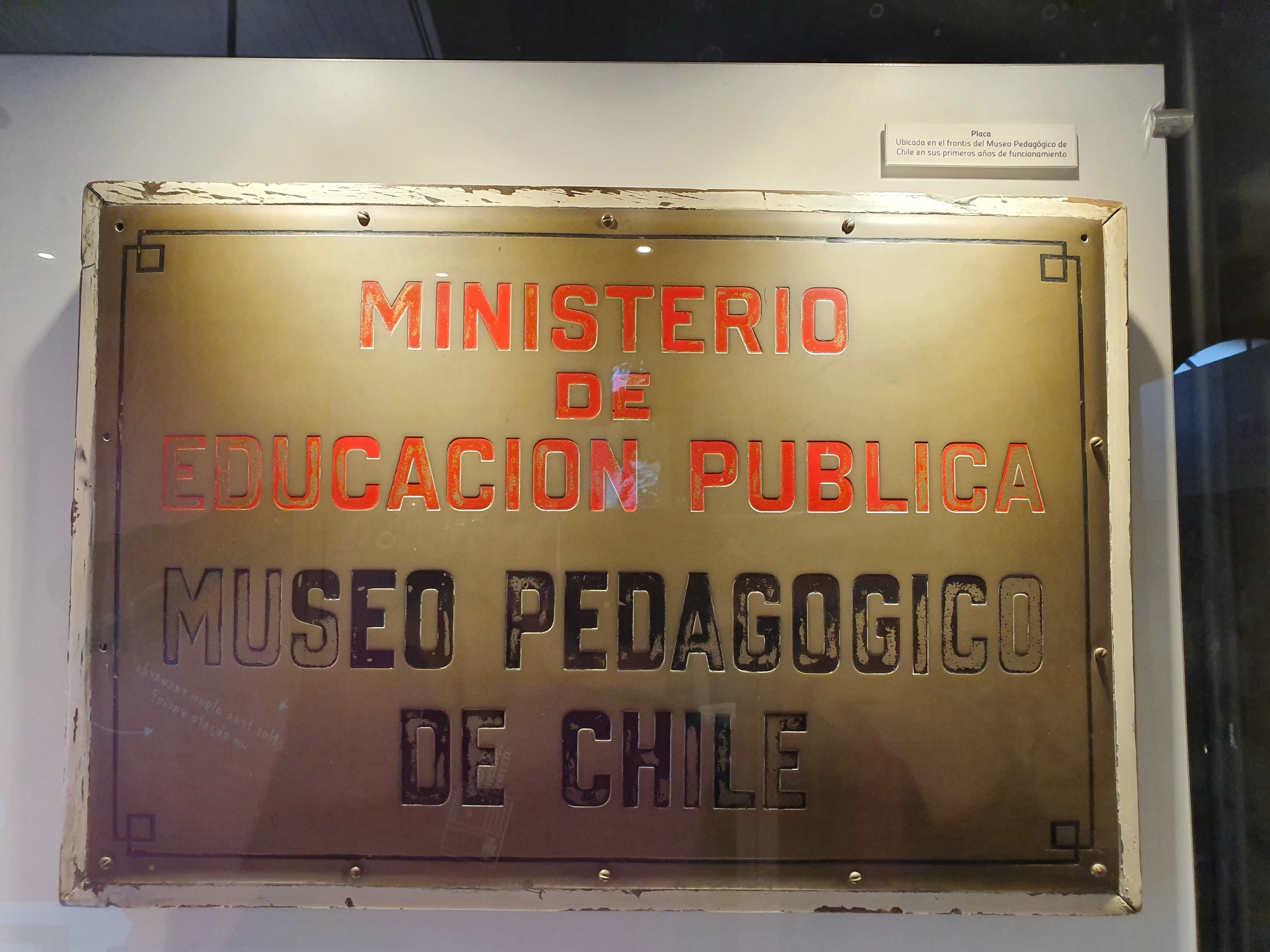 Placa del antiguo Museo Pedagógico de Chile, disponible en el Museo de la Educación Gabriela Mistral, en Santiago de Chile.